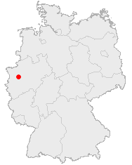 Lage der Stadt Mülheim an der Ruhr in Deutschland